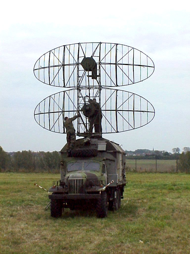 Aufbau der Antenne des Radargerätes P-15 „Flat Face -A“